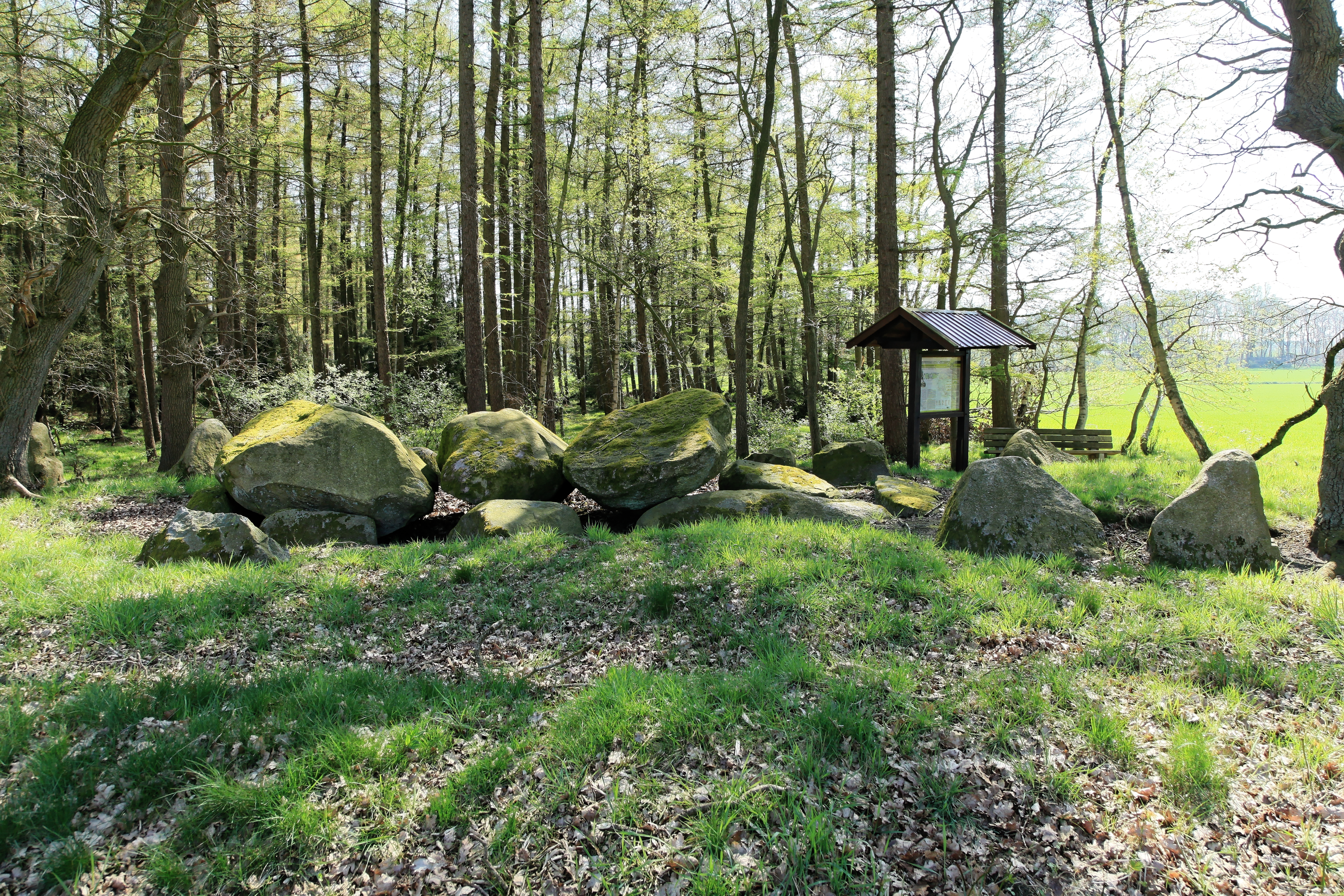 Großsteingrab bei den Düvelskuhlen II, Stavener Straße in Sögel